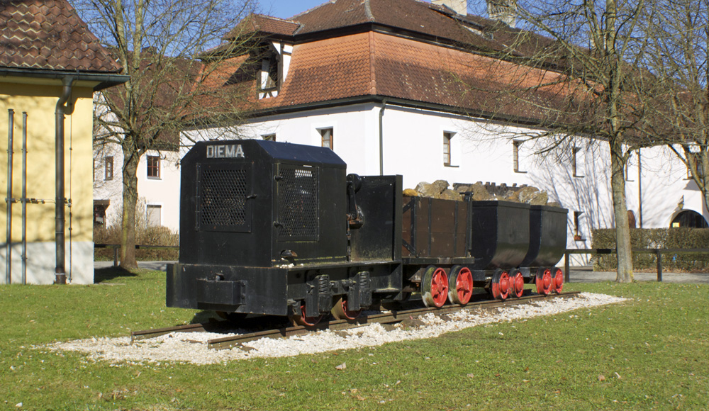 Industriemuseum Theuern, Loren vor dem Eingang